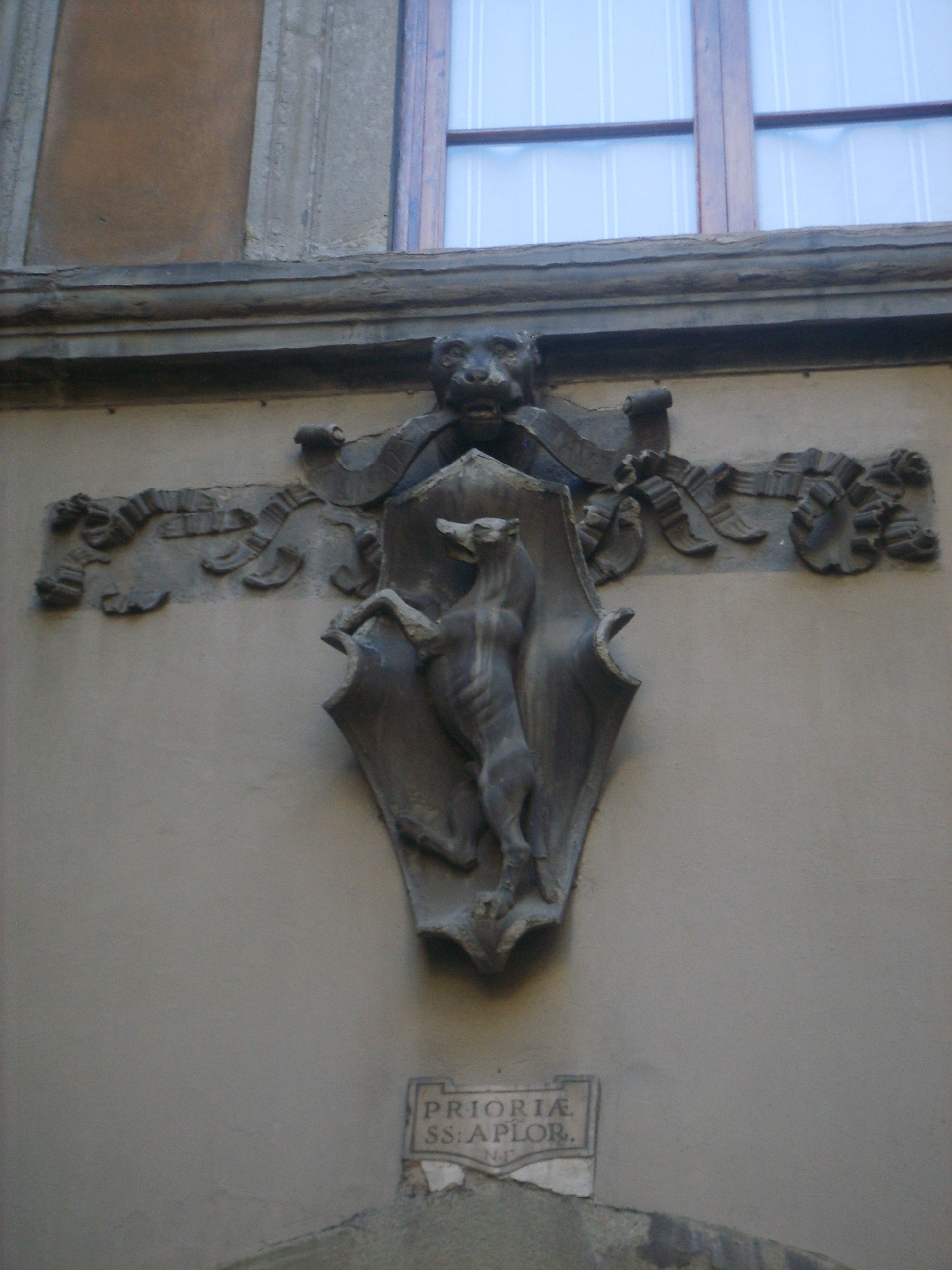 Stemma Altoviti, piazza del Limbo